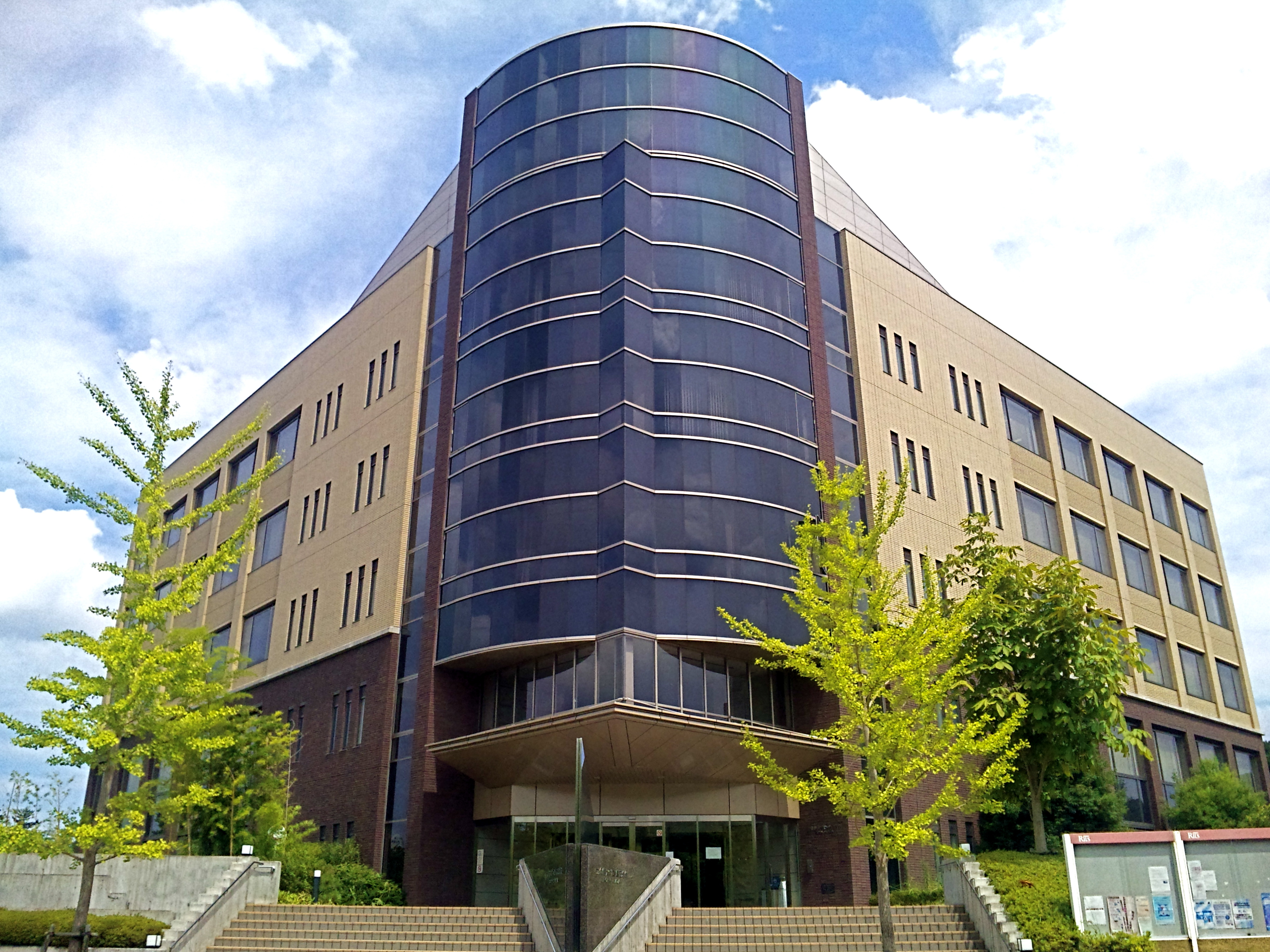 立命館大学 BKC